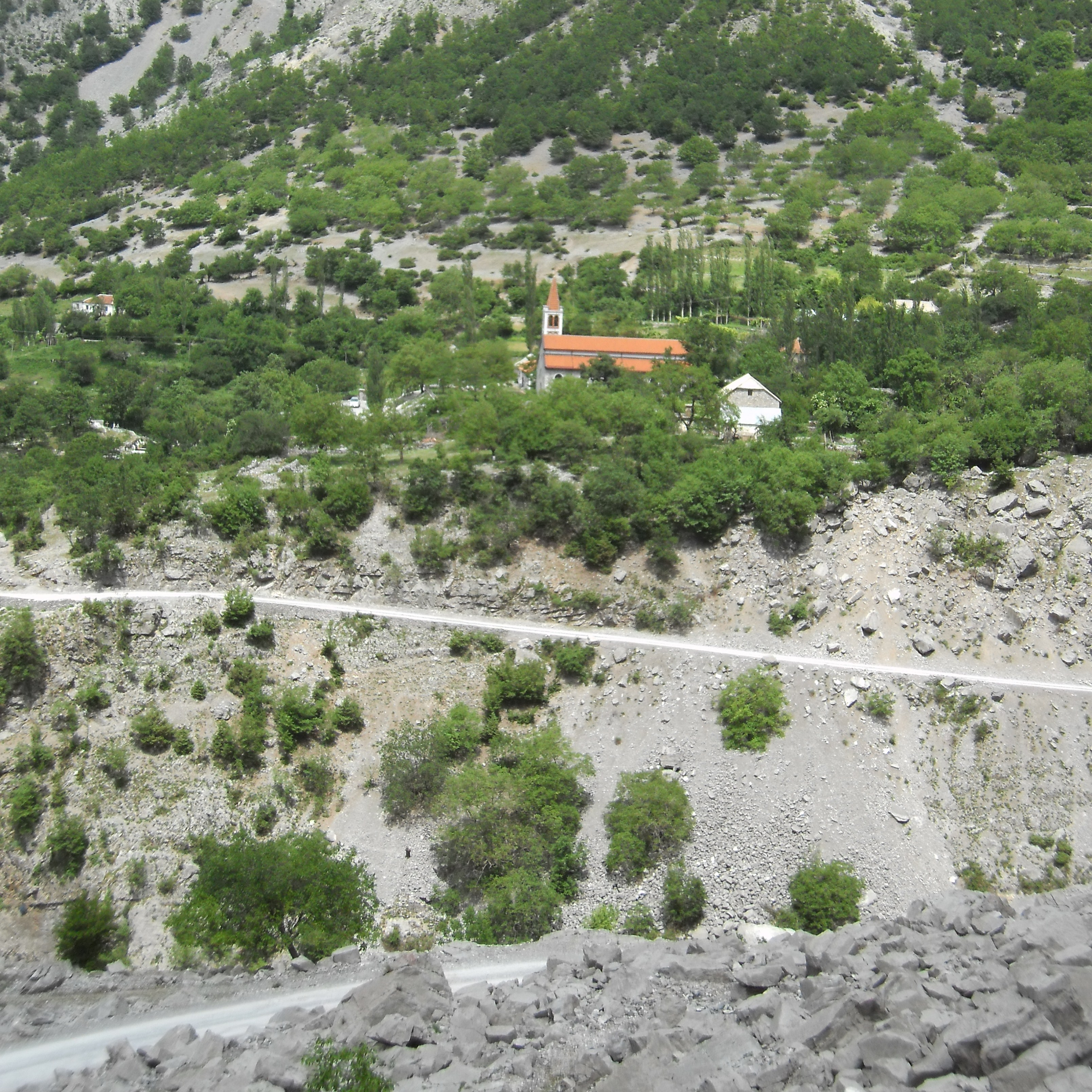 Blick auf Kirche von Selce, Albanien